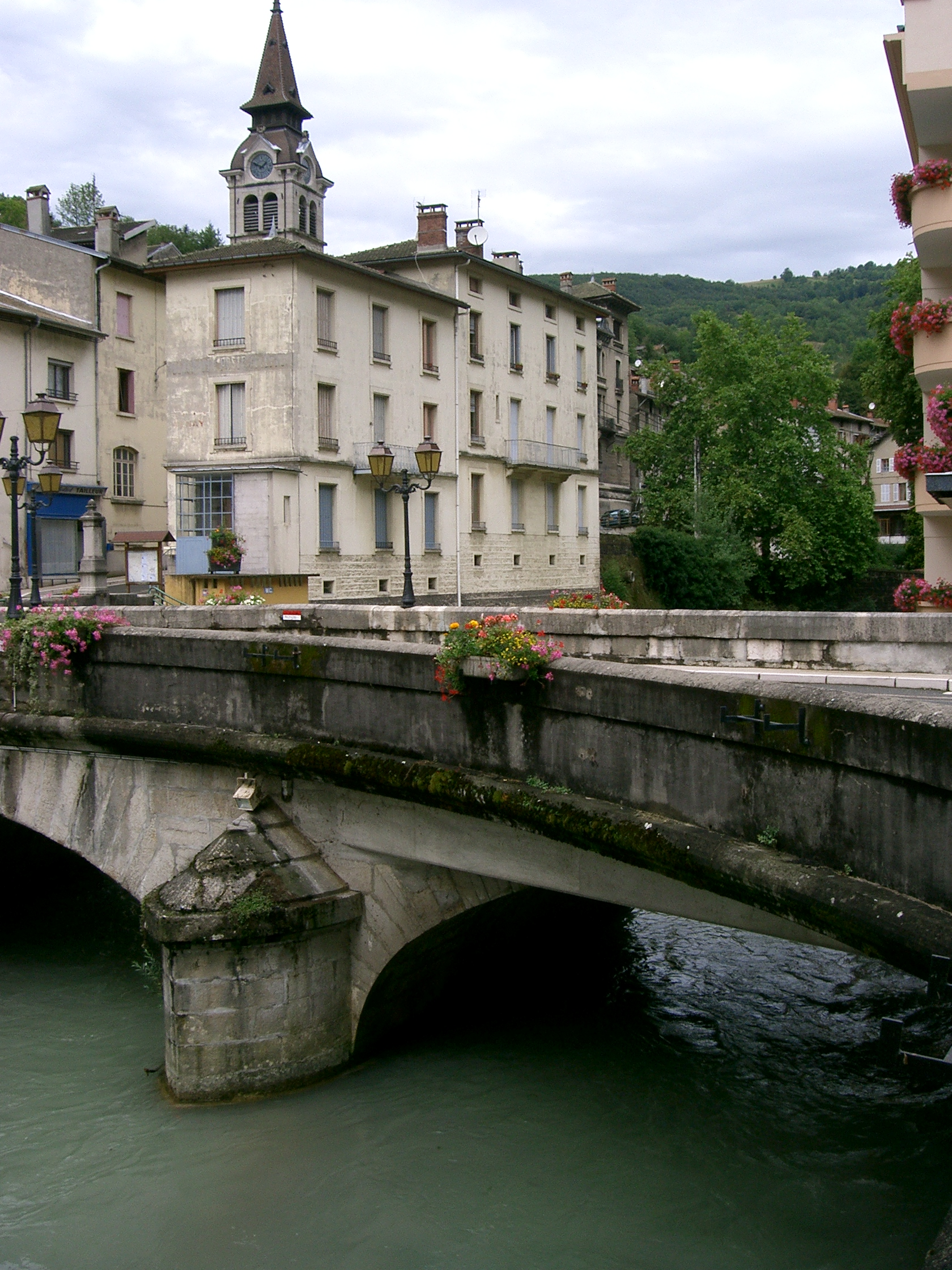 centre-ville Tenay dans l'Ain - France